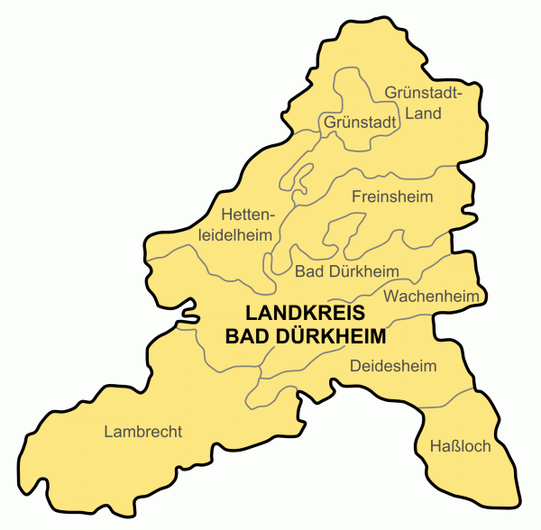 Karte des Landkreises Bad Dürkheim